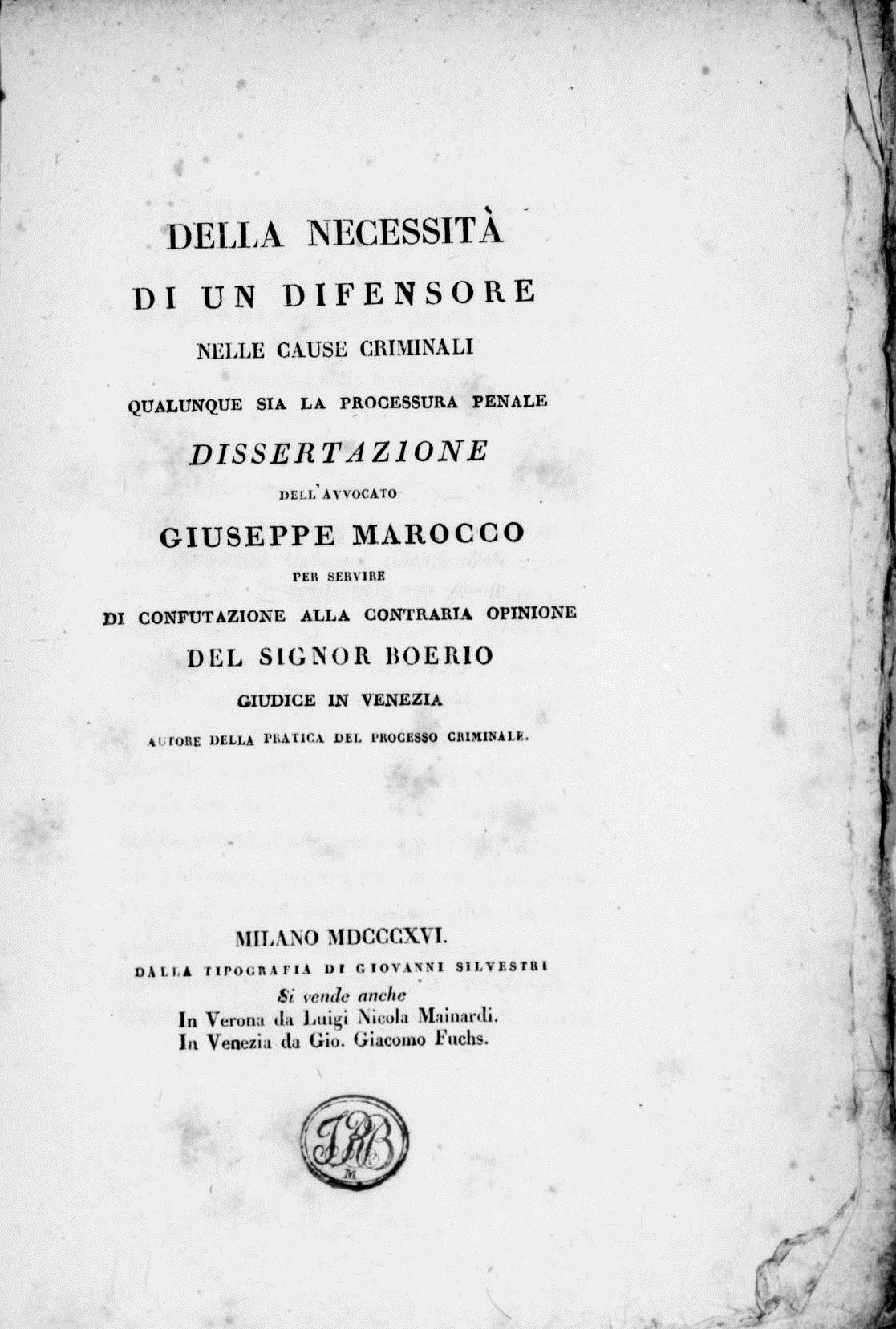 Frontespizio